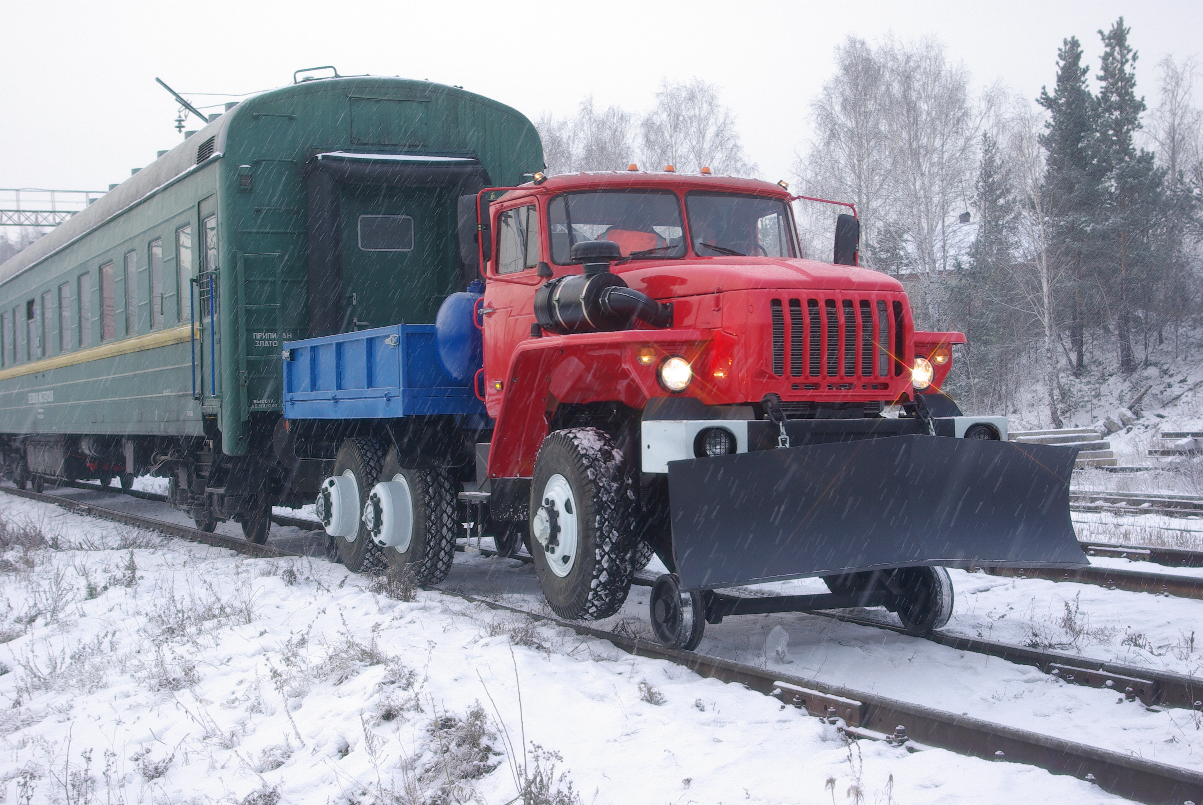 Локомобиль МАРТ-3 на маневровых работах